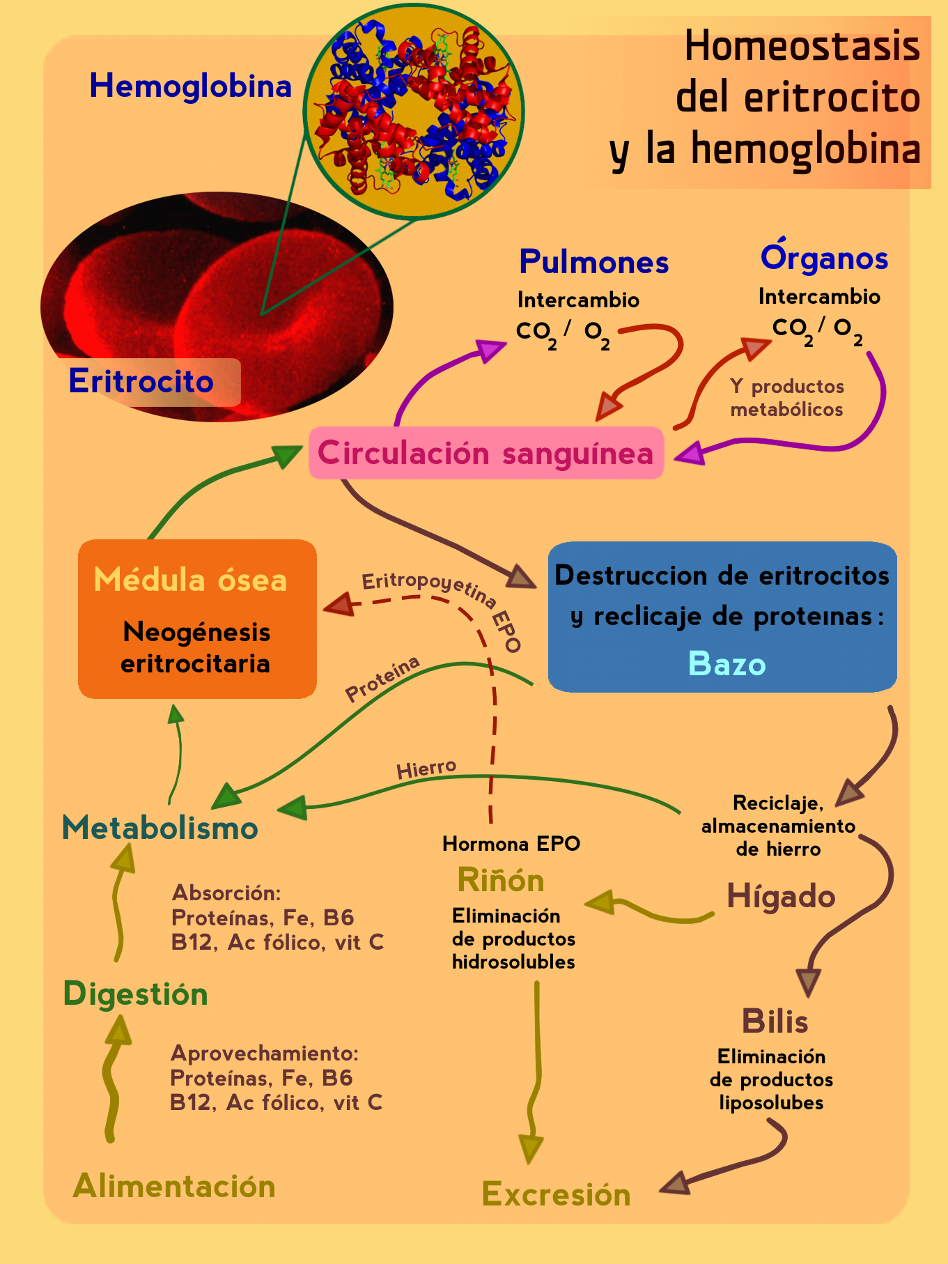 Nueva versión (en español) del gráfico FisiologiaEmoglobina.jpg de Peter Forster. Category:Protein images